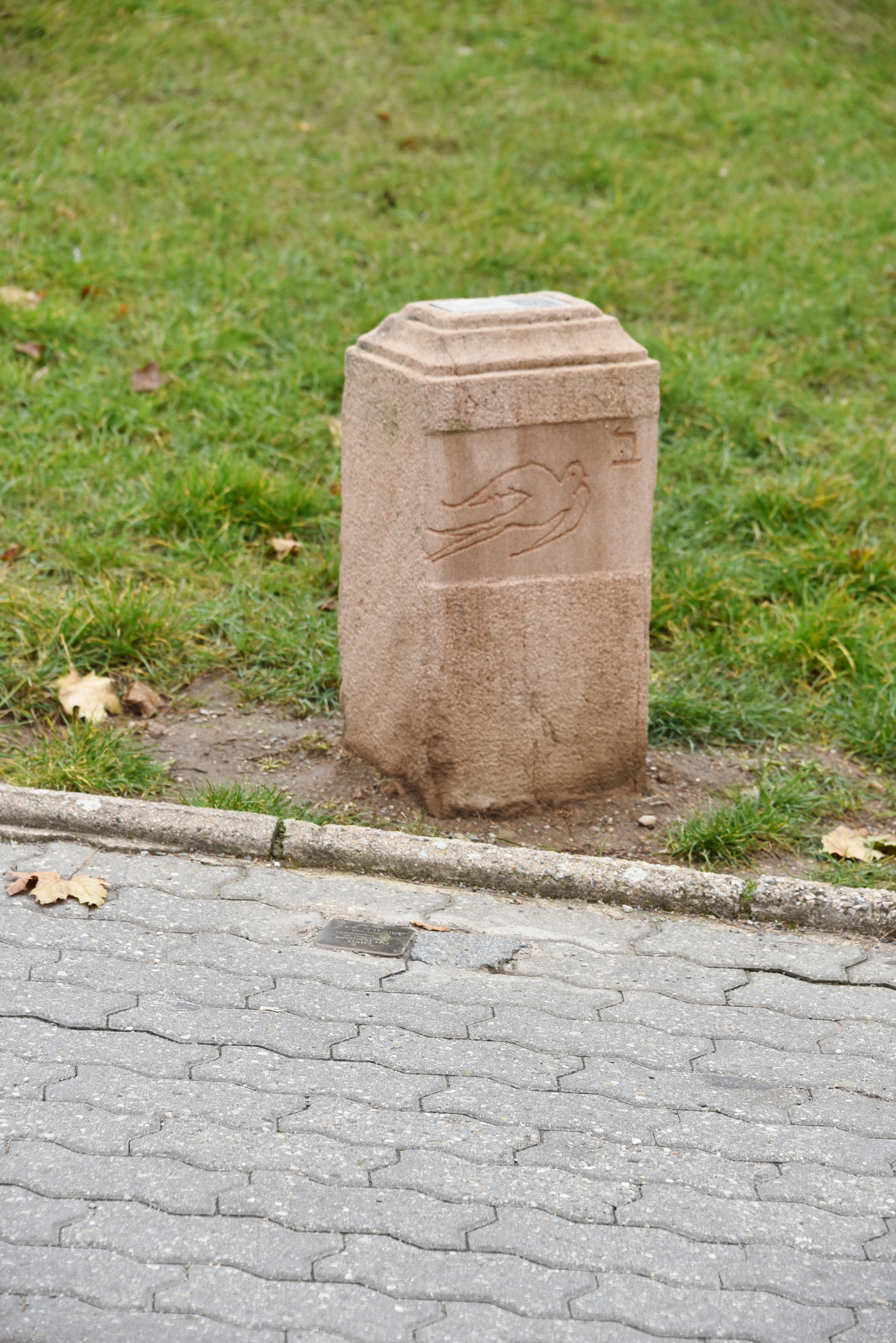 Stolperstein für Zofie Spitzová in Tišnov Brněnská 1710